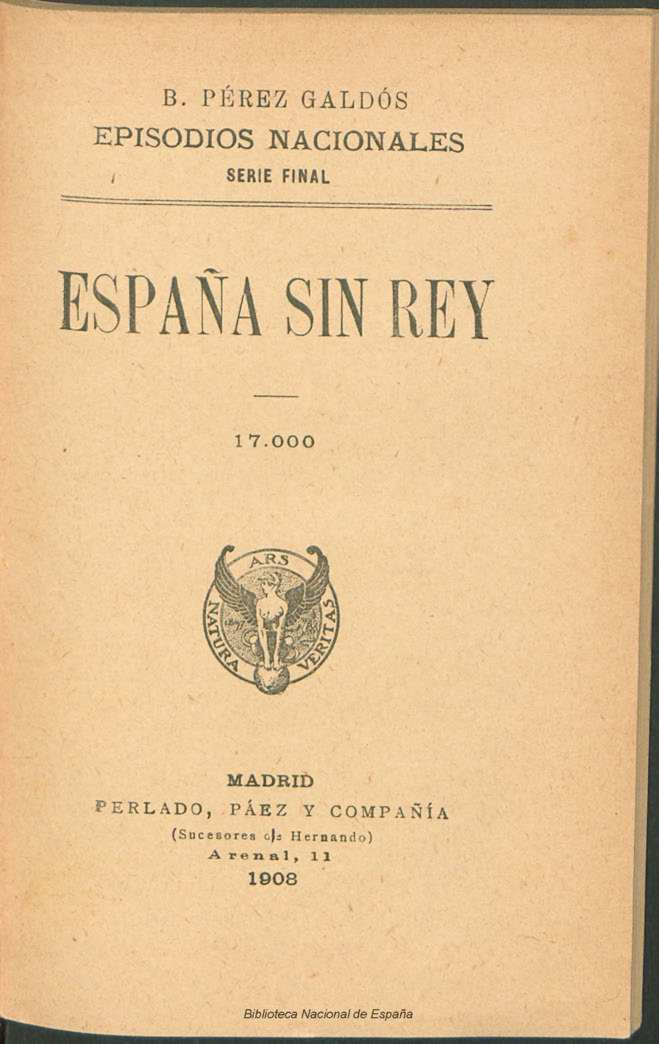 España sin rey Autor: Pérez Galdós, Benito (1843-1920) Fecha: 1908 Datos de edición: Madrid, Perlado, Páez y Compañía (Sucesores de Hernando)